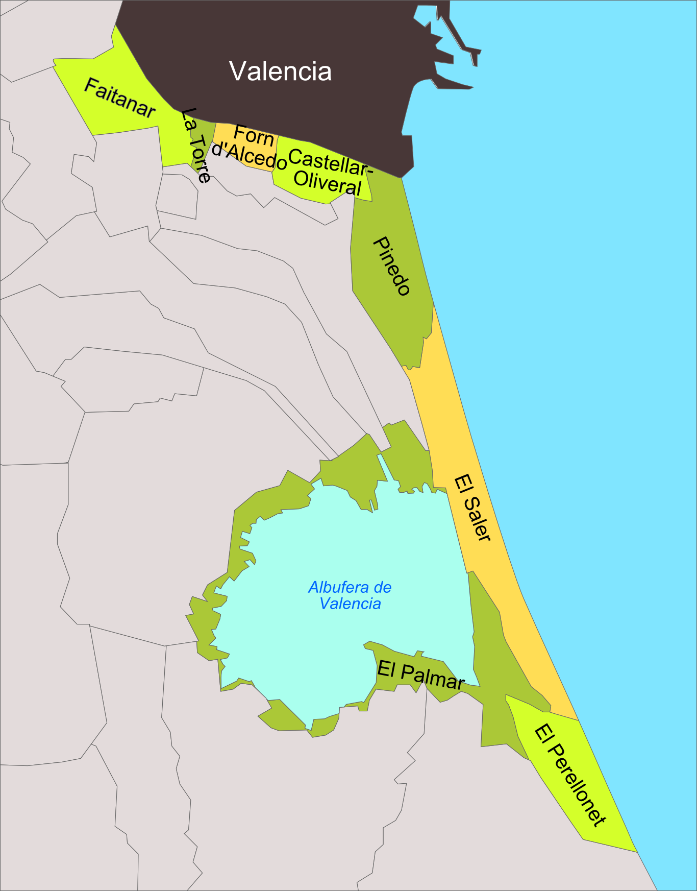 Mapa del districte 'Poblats del Nord' de la ciutat de València.